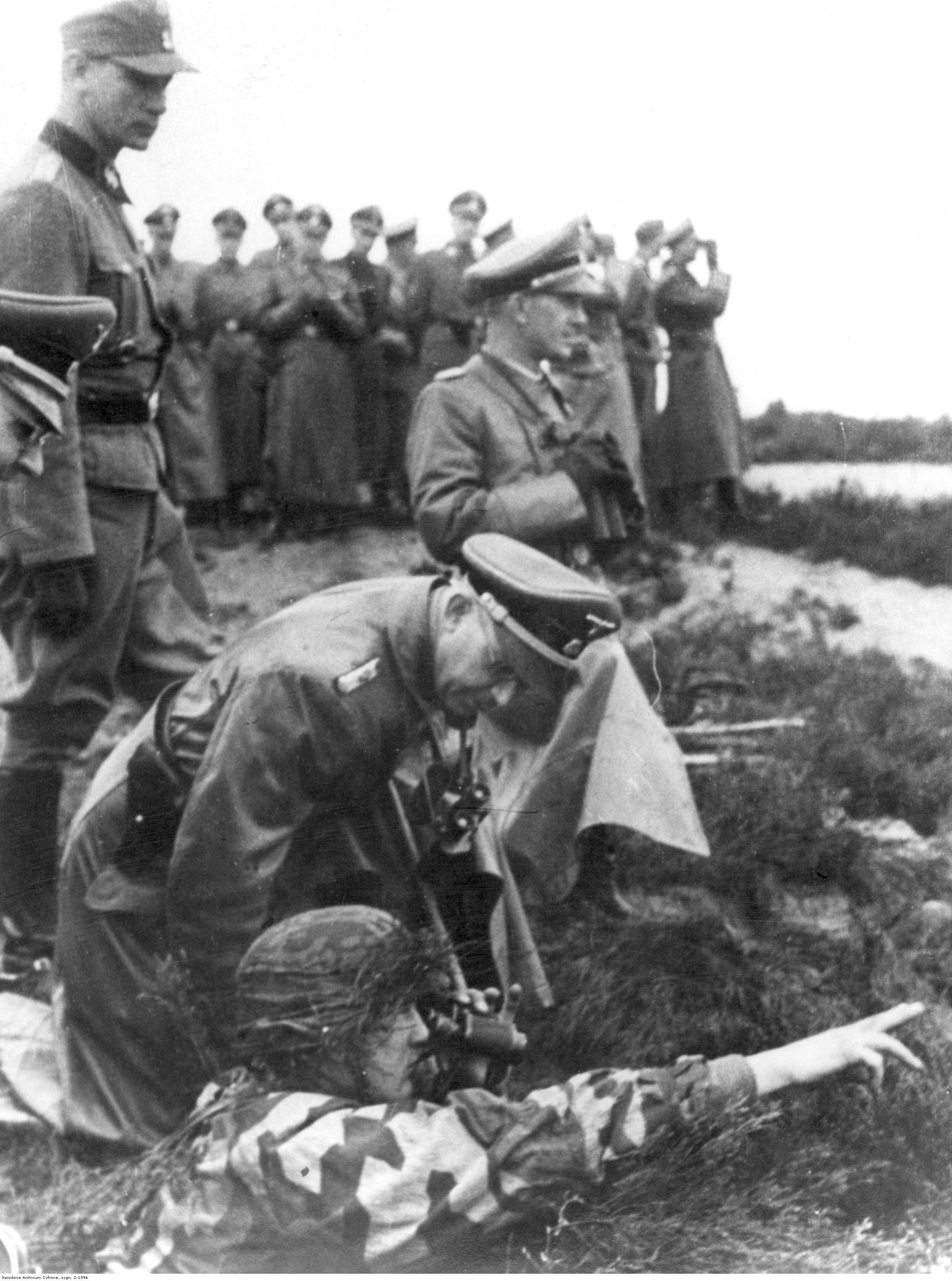 Reichsfuhrer Heinrich Himmler wizytuje 14. Dywizje Grenadierów Waffen SS "Galizien". Na pierwszym planie widoczny żołnierz z lornetką w okopie, obok Heinrich Himmler.